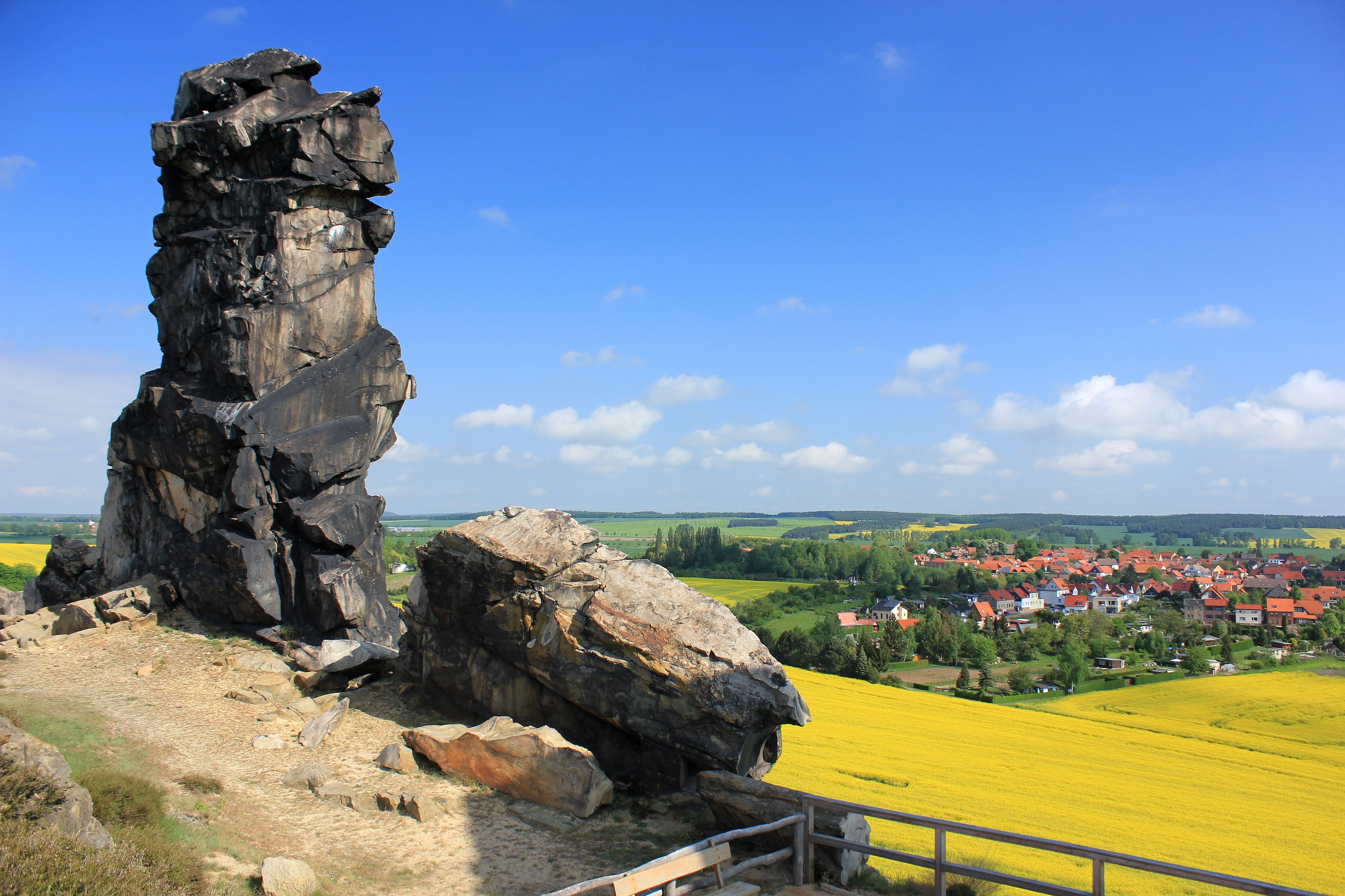 Die Teufelsmauer im NSG 64 „Teufelsmauer und Bode nordöstlich Thale“ südwestlich von Weddersleben.